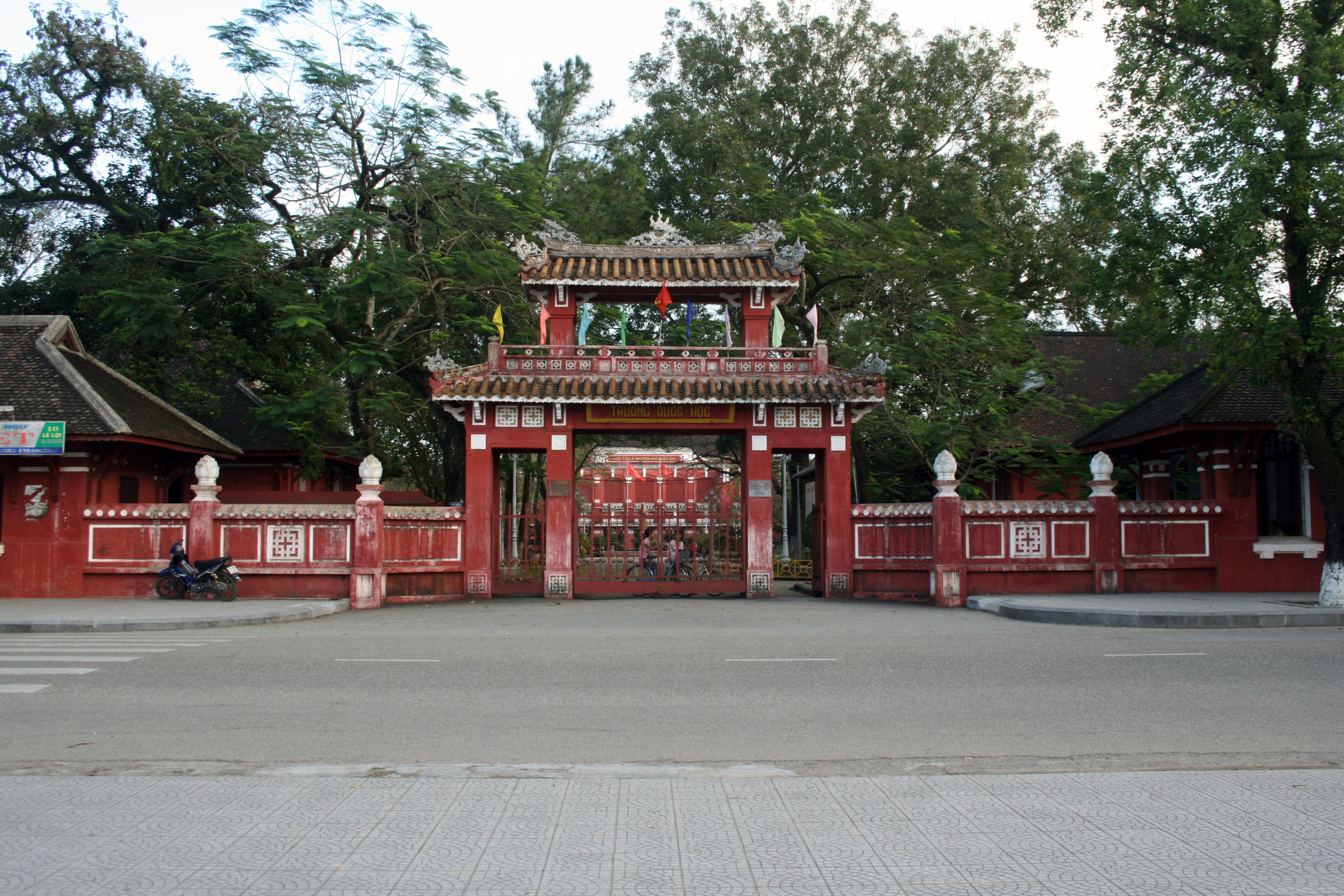 Quốc Học school in Huế city.